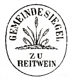 Gemeindesiegel von Reitwein